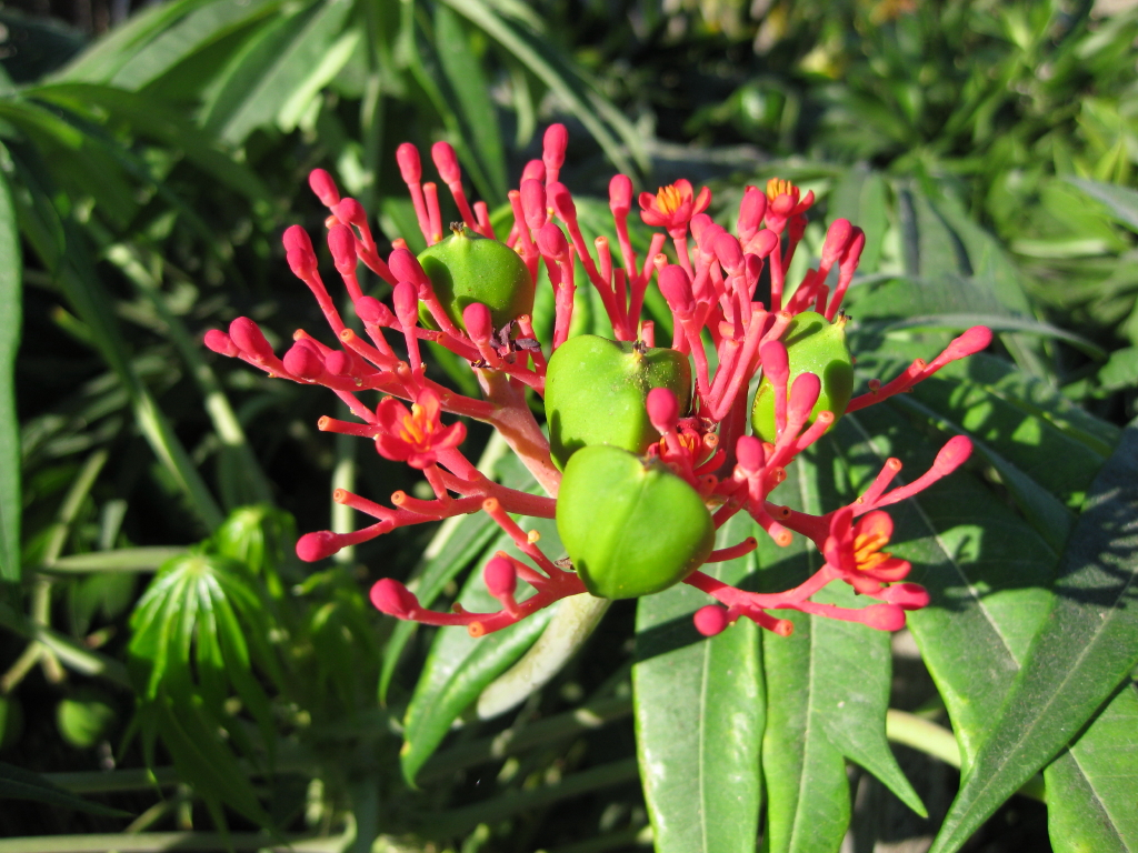 Jatropha multifida cultivated in Vilanculos in Mozambique